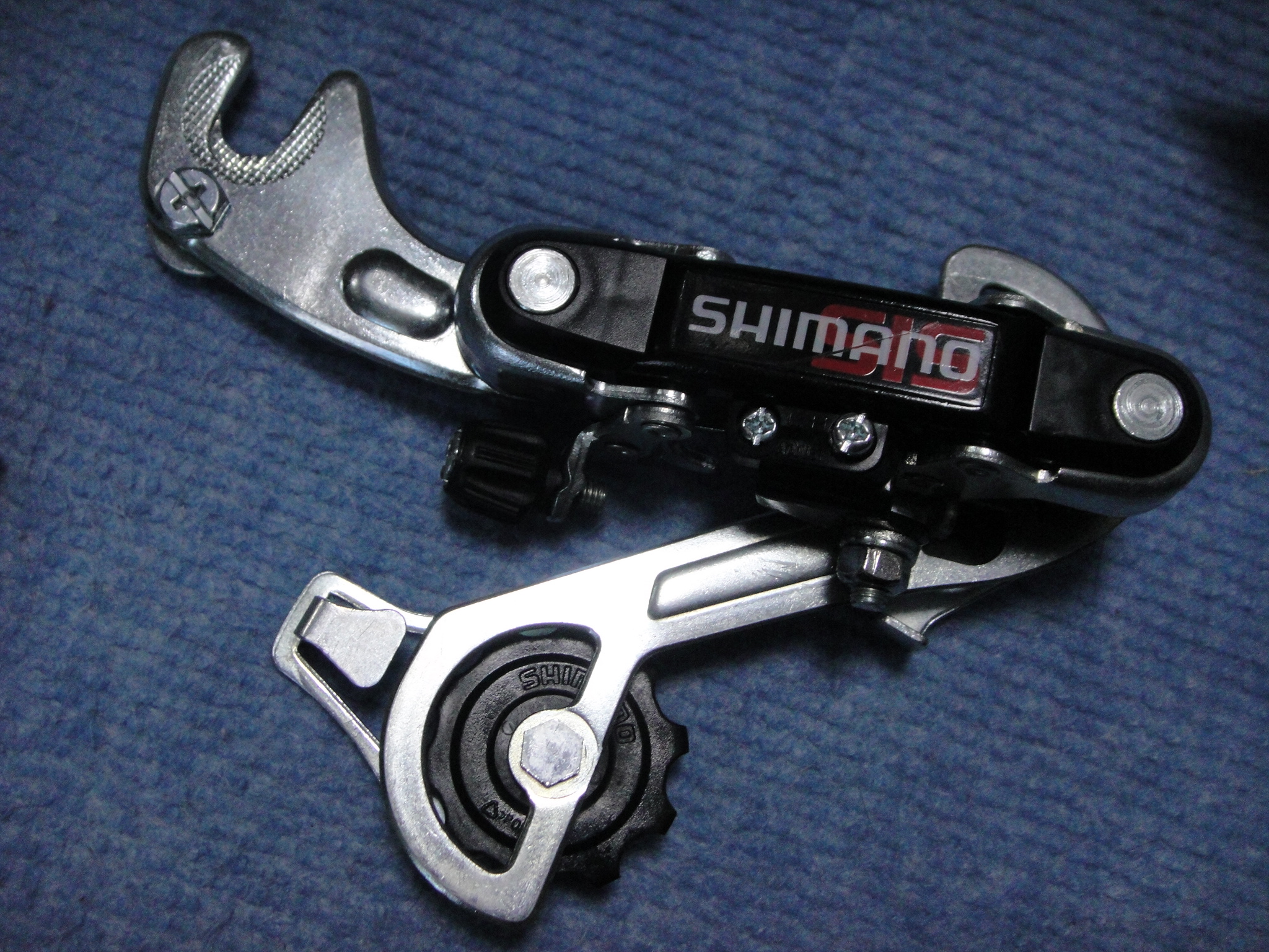 SHIMANOのリアディレイラー『TY-18』